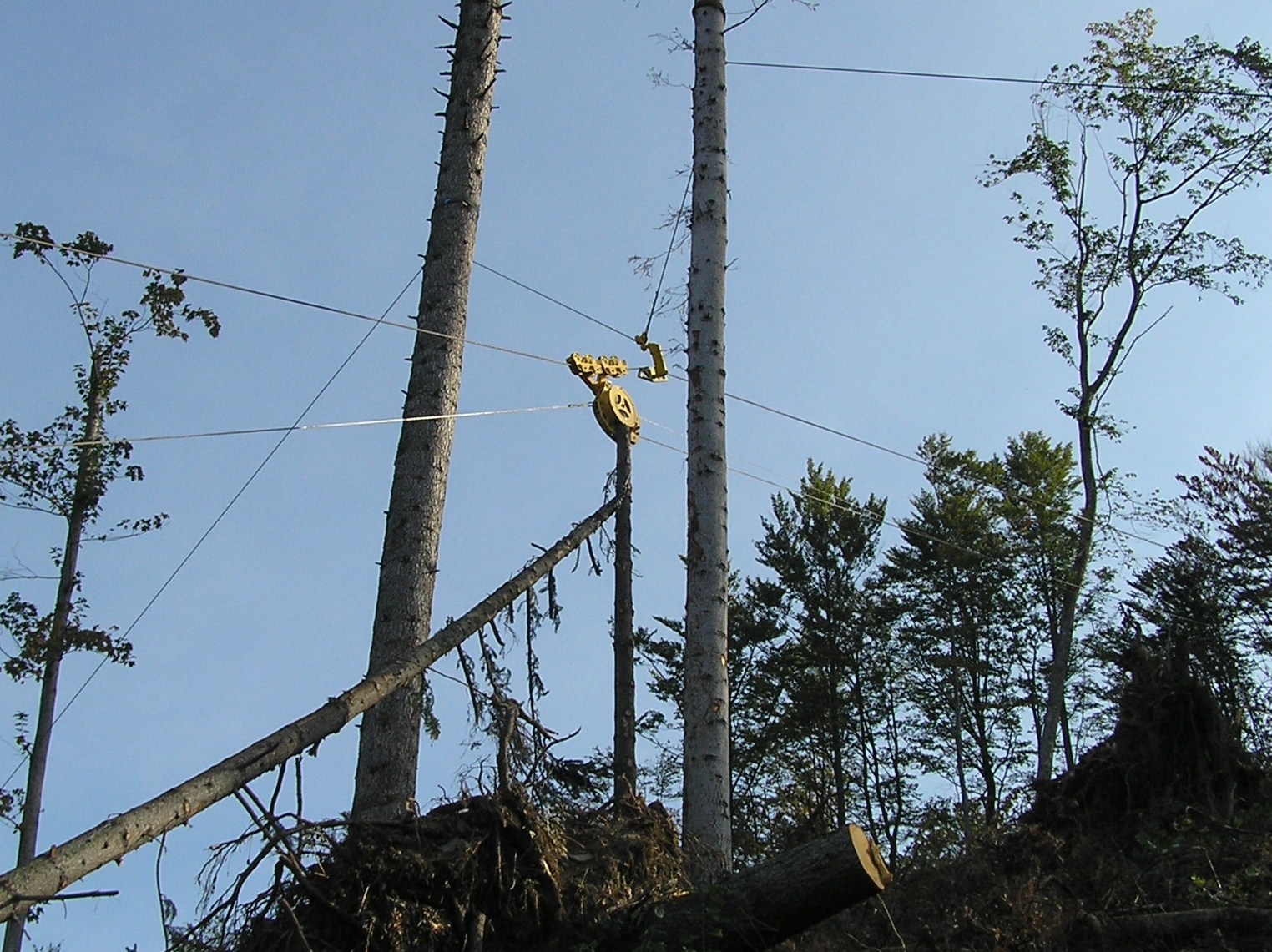 support intermediare pour la débardage par câble.